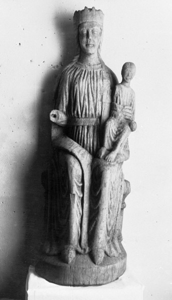 Träskulptur framställlande Maria med barnet. Från 1200-talets senare del. Efter restaurering. 1951. Kategori: (05) SkulpturerTräskulptur framställlande Maria med barnet. Från 1200-talets senare del. Efter restaurering. 1951.